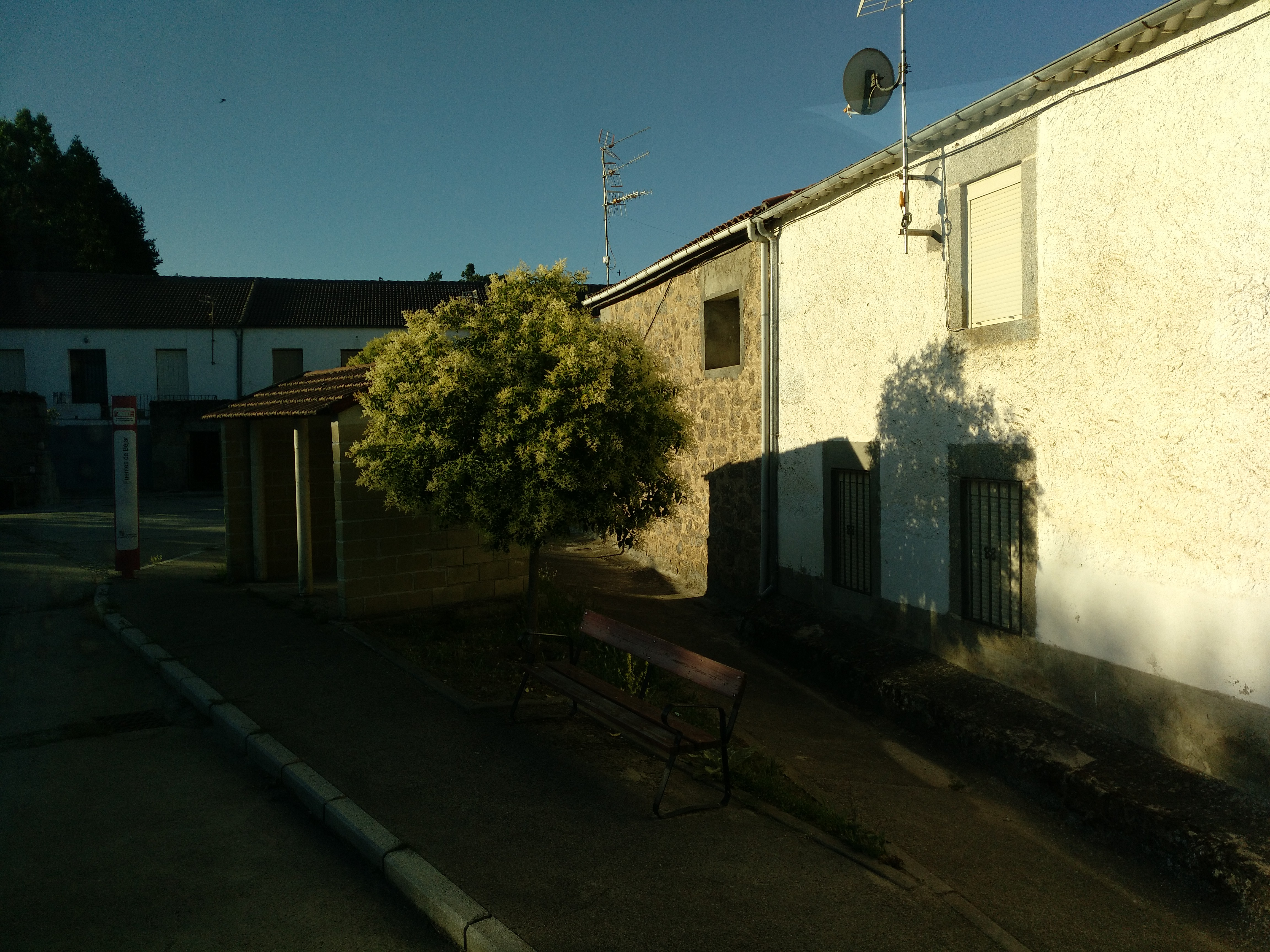 Parada de autobuses de Fuentes de Béjar (Salamanca)